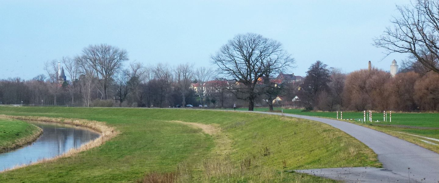 Neue Luppe bei Lützschena, links der Kirchturm, rechts der Bismarckturm